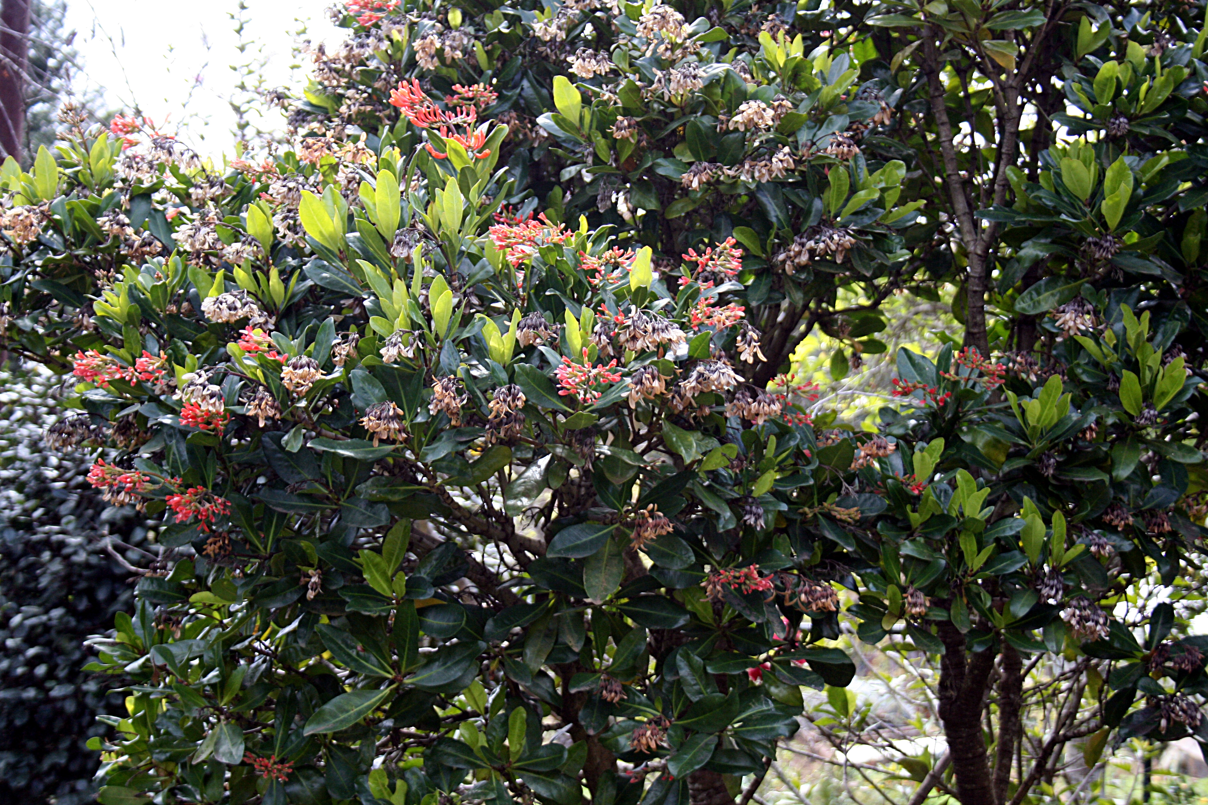 Alberta magna (Natal flame bush) — in the gardens of Quinta do Palheiro Ferreiro, in Funchal, Madeira.